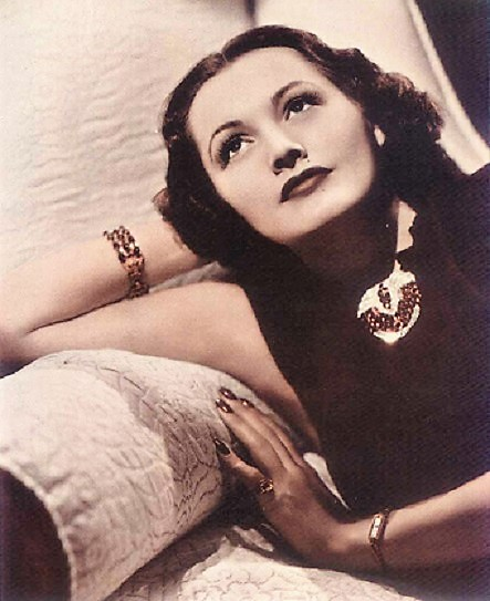 Kay Sutton